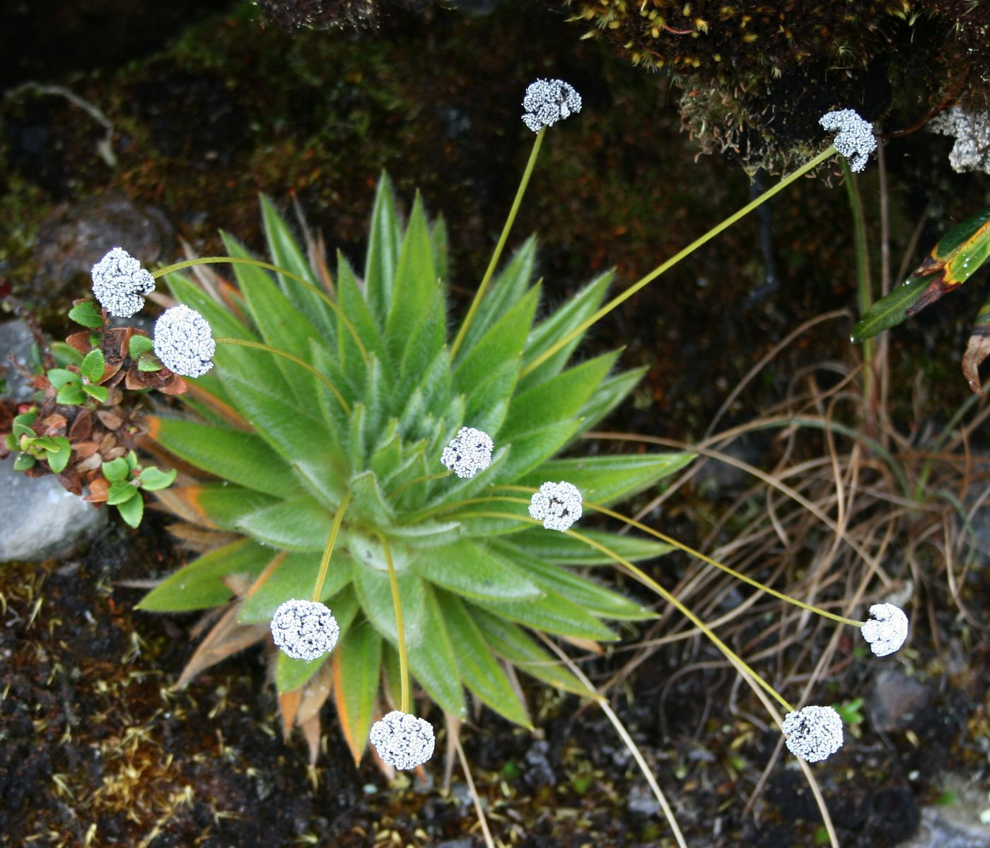 Paepalanthus alpinus, Eriocaulacaceae – Kolumbien/Colombia: Dpto. Cundinamarca, Parque Nacional Natural Chingaza, Sendero Lagunas de Siecha, ca. 11–12 km SSE Guasca, ca. 3450 m